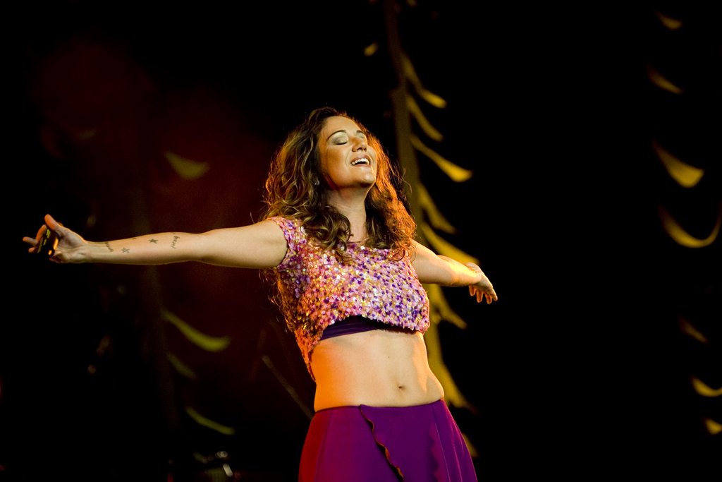 Maria Rita no Coliseu de Lisboa em 2008.